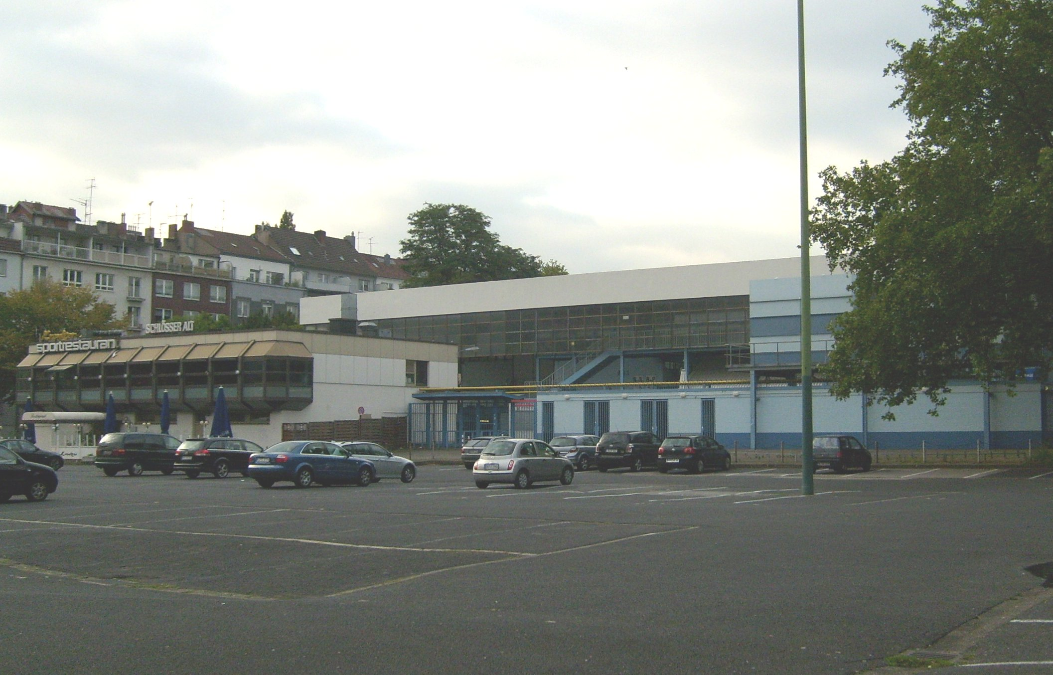 Eisstadion an der Brehmstraße - Parkplatz am Sportrestaurant "Kreutzer" Blick von Süden (September 2007)